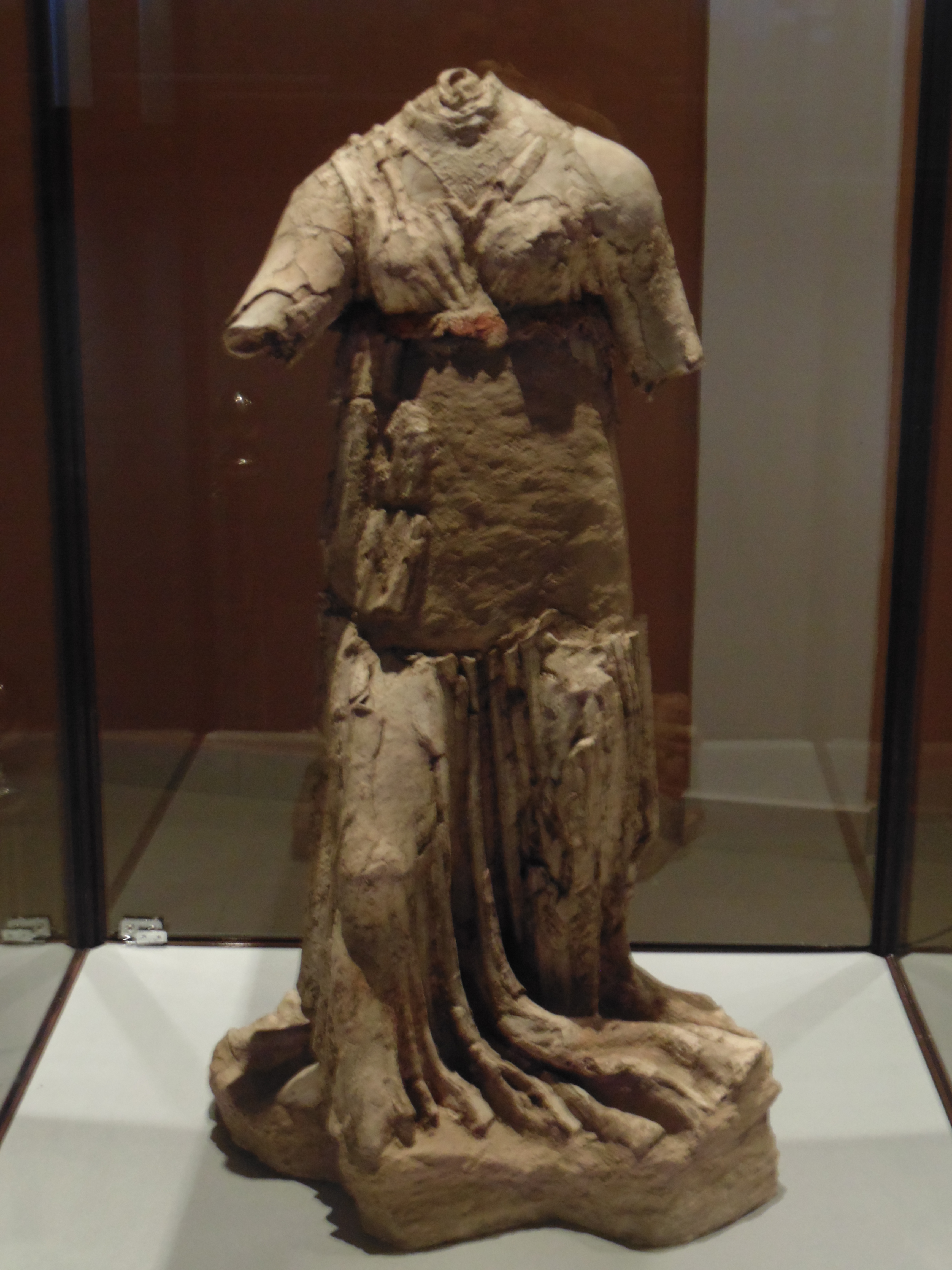 Скульптура женщины без головы доисламского периода. Экспонат хранится в Национальном музее Таджикистана.